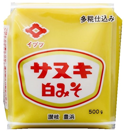 idutumiso